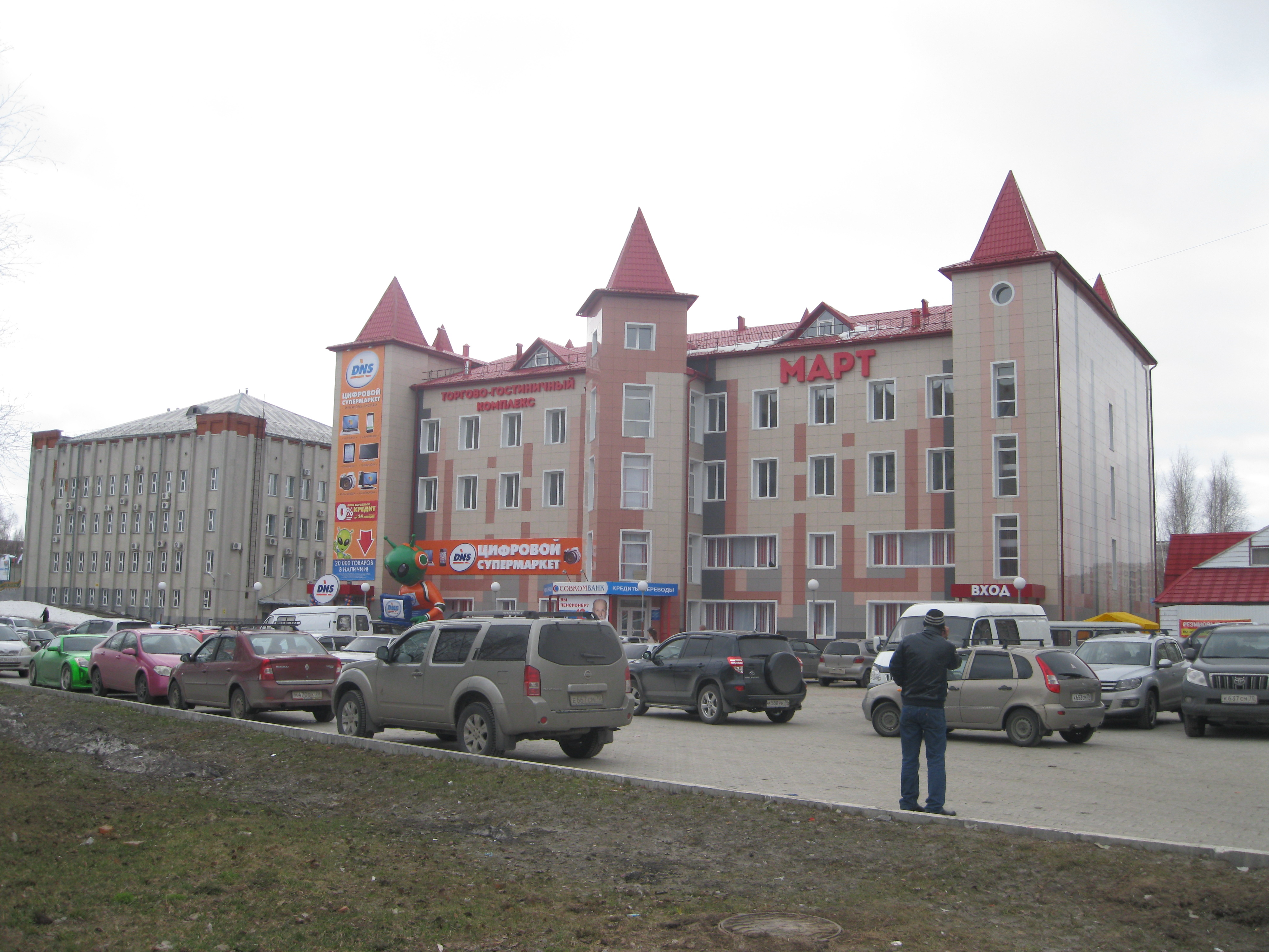 ТГК Март Стрежевой